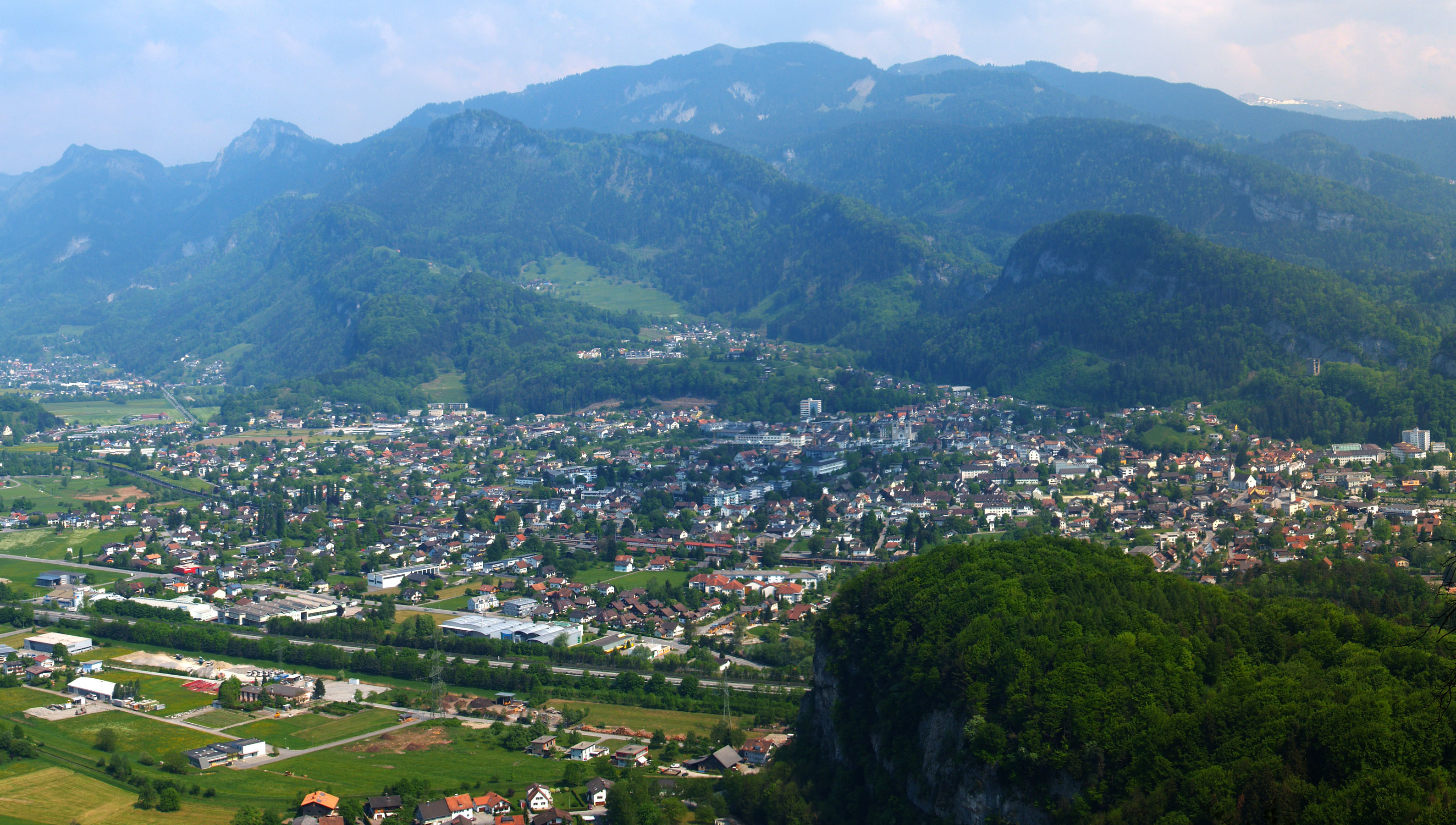 Götzis vom Kummenberg aus gesehen